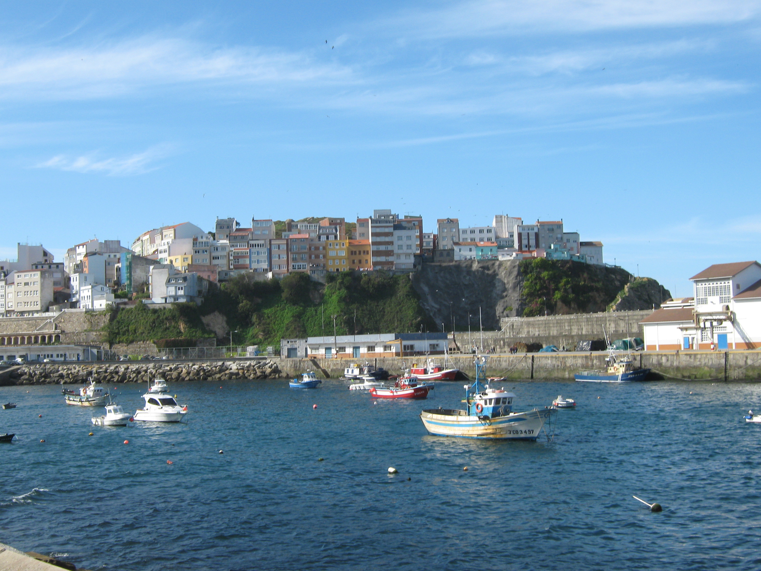 Puerto de Malpica